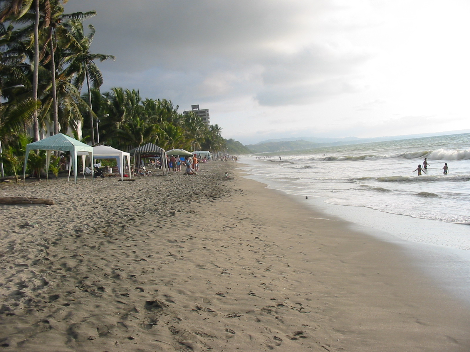 Photographer: Aldo Barba, Quito Date: 04.30.2006 Description: Same Beach. Esmeraldas - Ecuador. Descripción:Playa Same. Esmeraldas - Ecuador.